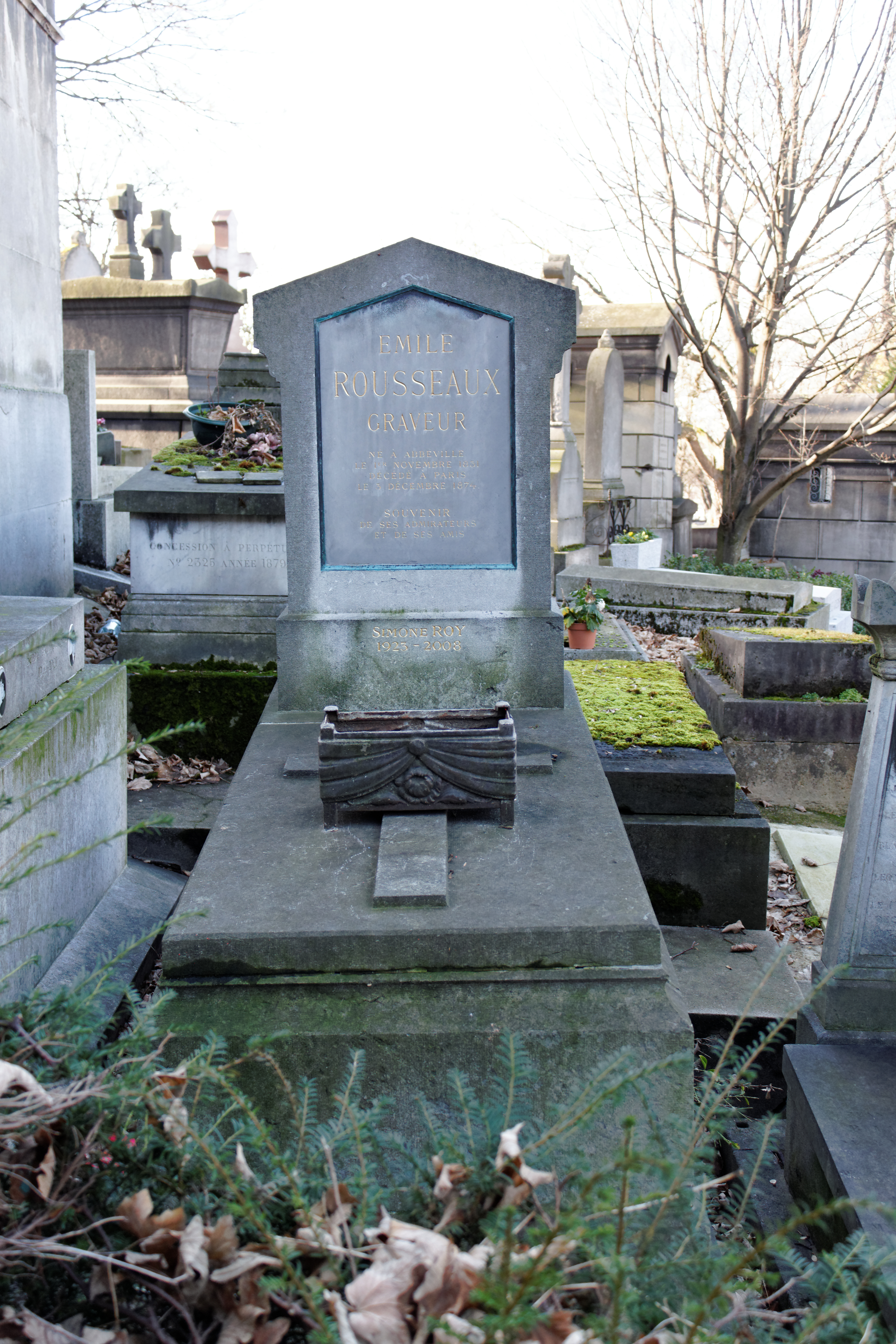 Sépulture du graveur Émile-Alfred Rousseaux (1831-1874), élève de Louis-Pierre Henriquel-Dupont.